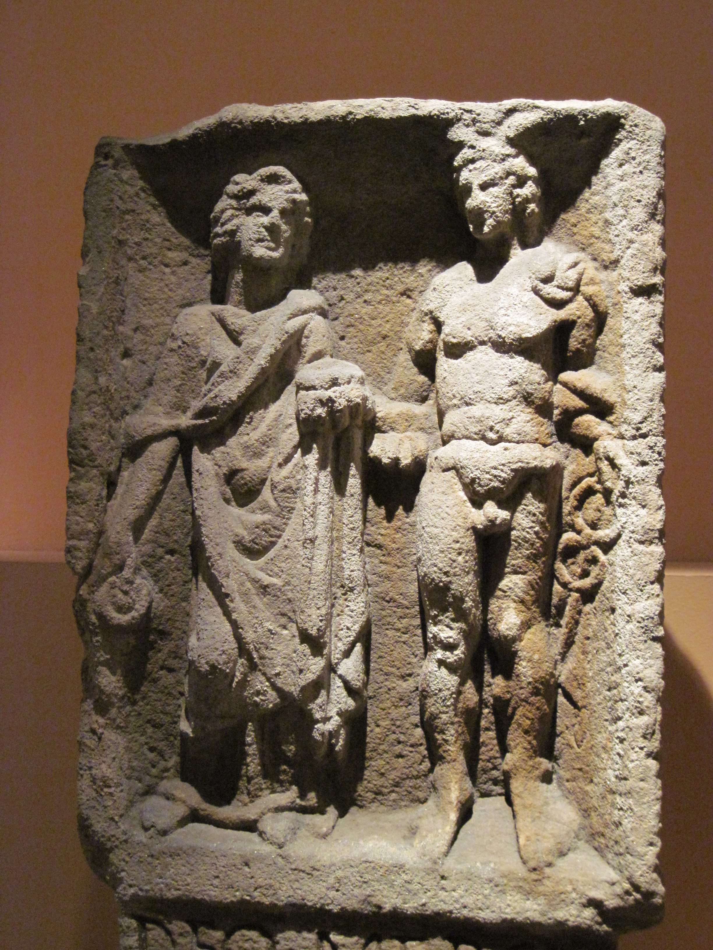 Interlingua: Basse relievo de Mercurio e Rosmerta, divinitates gallic (Eisenberg, Donnersbergkreis). Facte inter le annos 200 e 250.